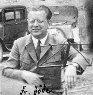 Bildnis von Fritz Jöde